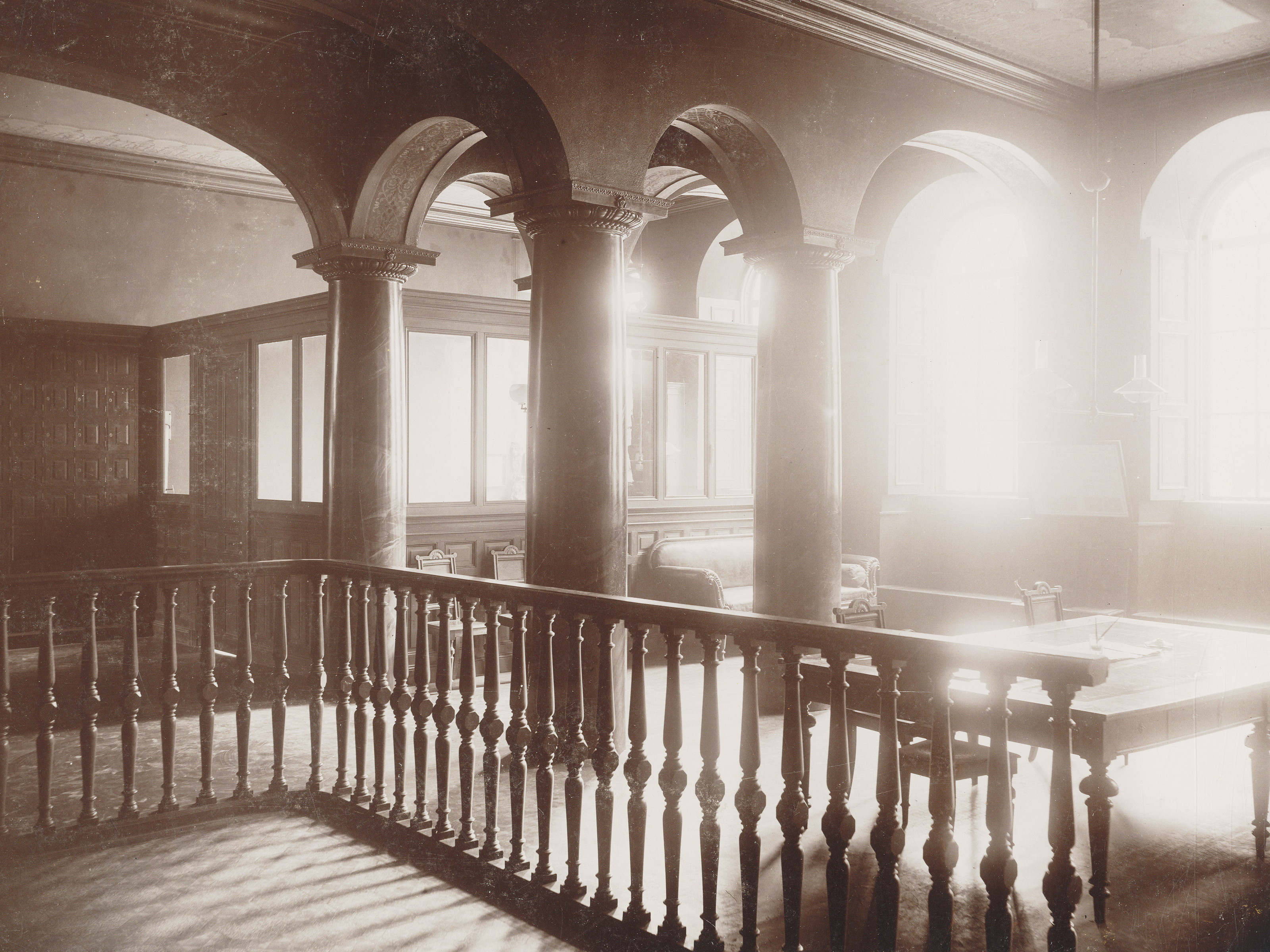 Gamla stans polisstation (f.d. Synagogan) i kvarteret Cupido